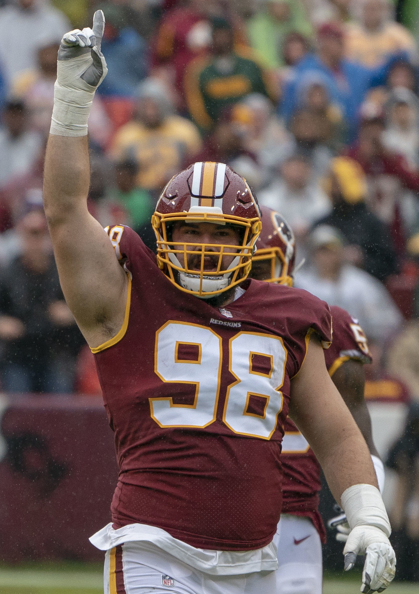 Packers at Redskins 09/23/18